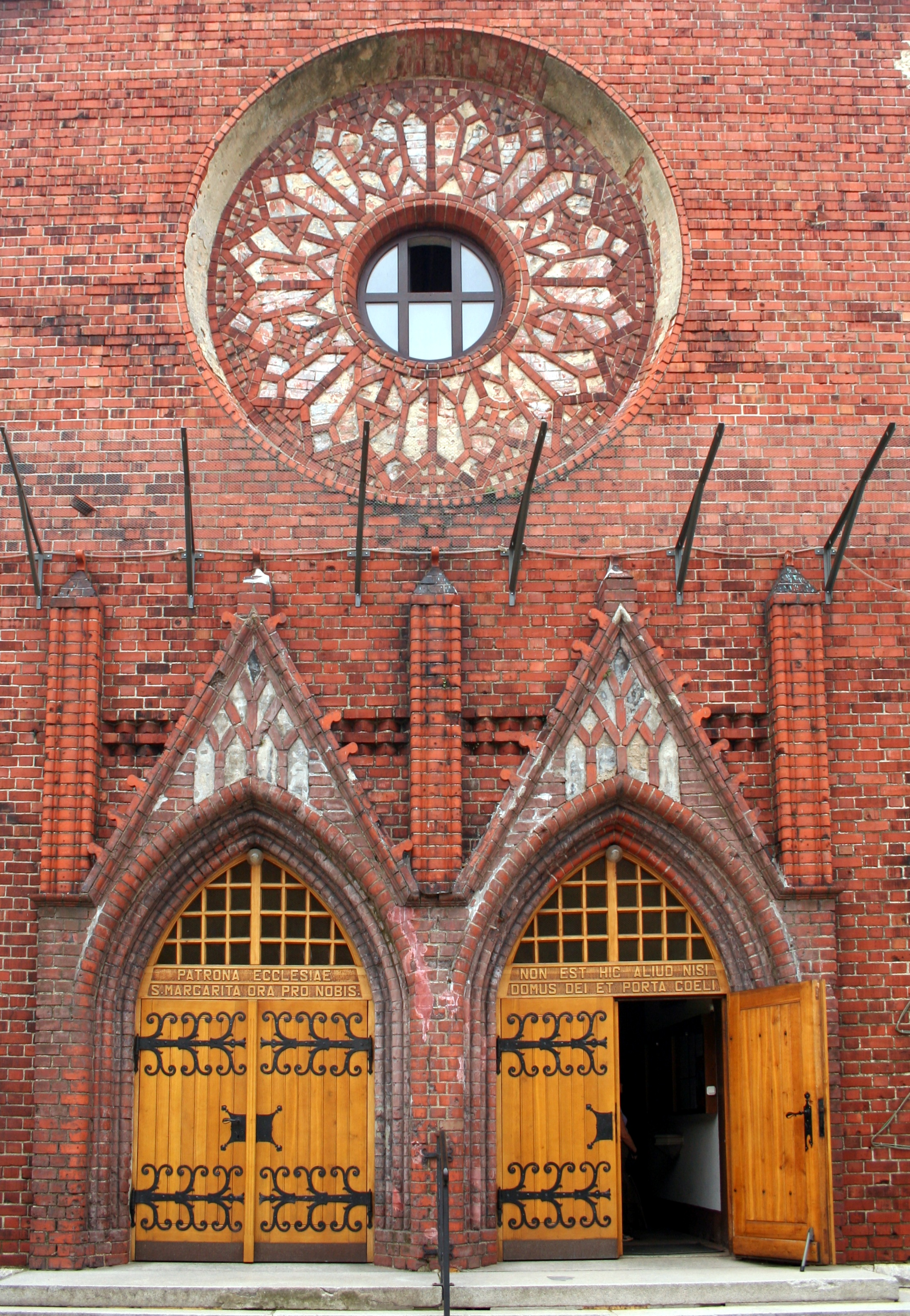 rozeta na kościele św. Małgorzaty w Lyskach, powiat rybnicki